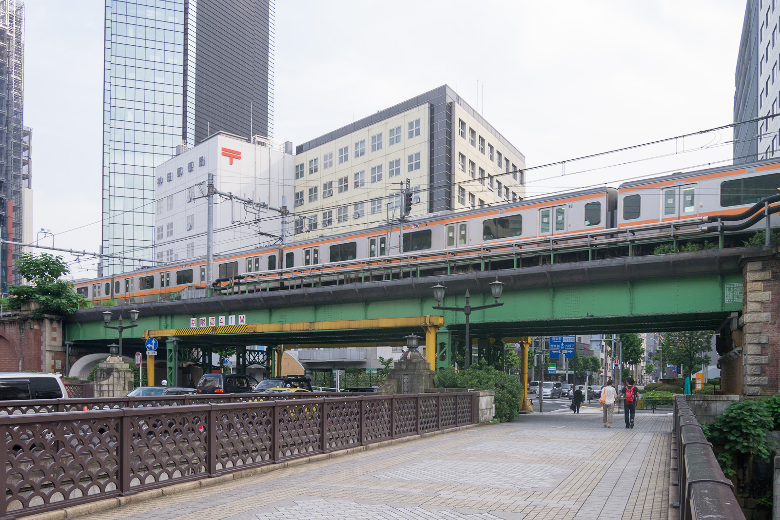 JR東日本中央本線昌平橋架道橋（神田-御茶ノ水間）。